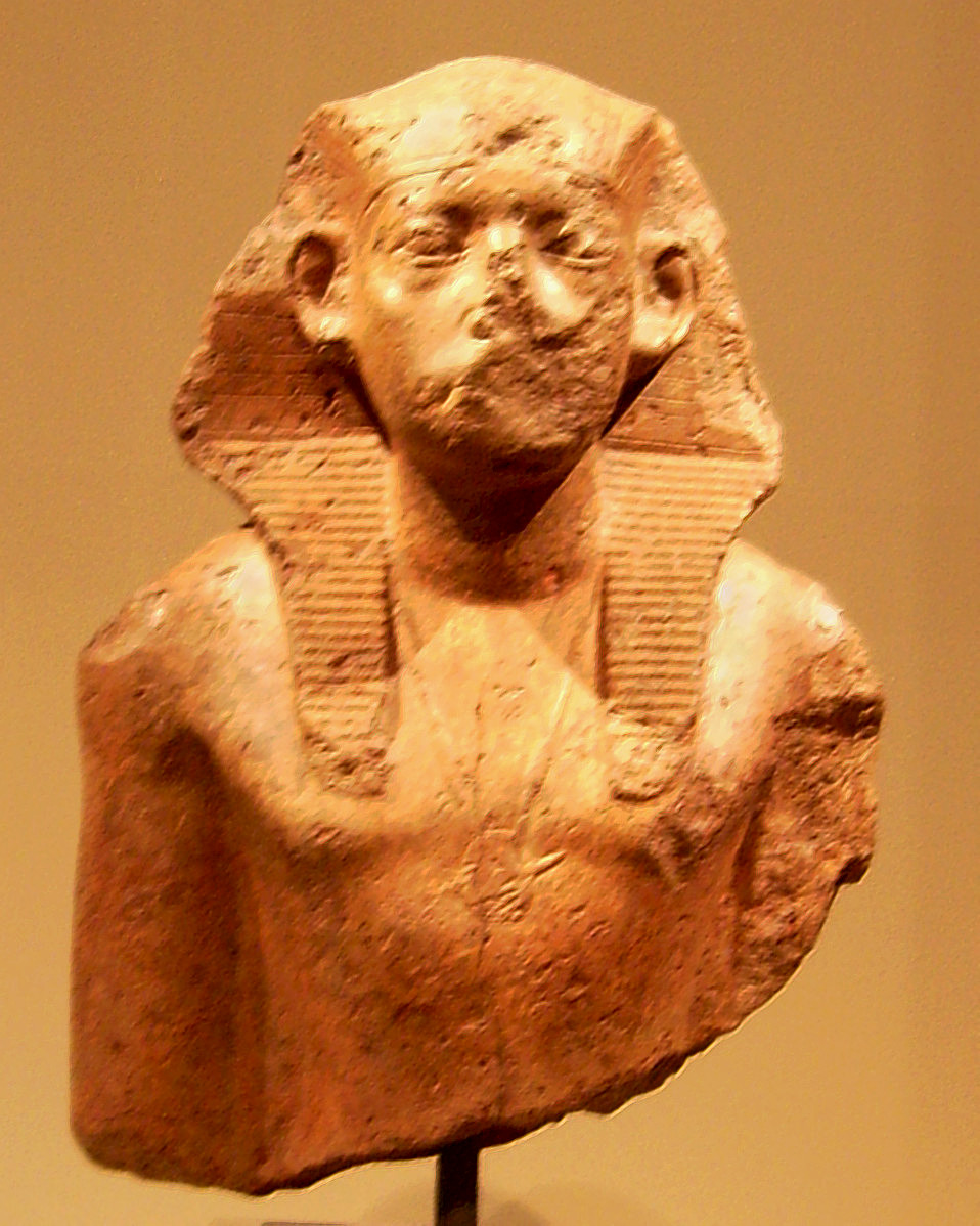 Kopf einer Statue Amenemhets III. mit Nemes-Kopftuch; Mittleres Reich, 12. Dynastie, um 1950 v. Chr.; Quarzit; Ägyptisches Museum Berlin/Altes Museum